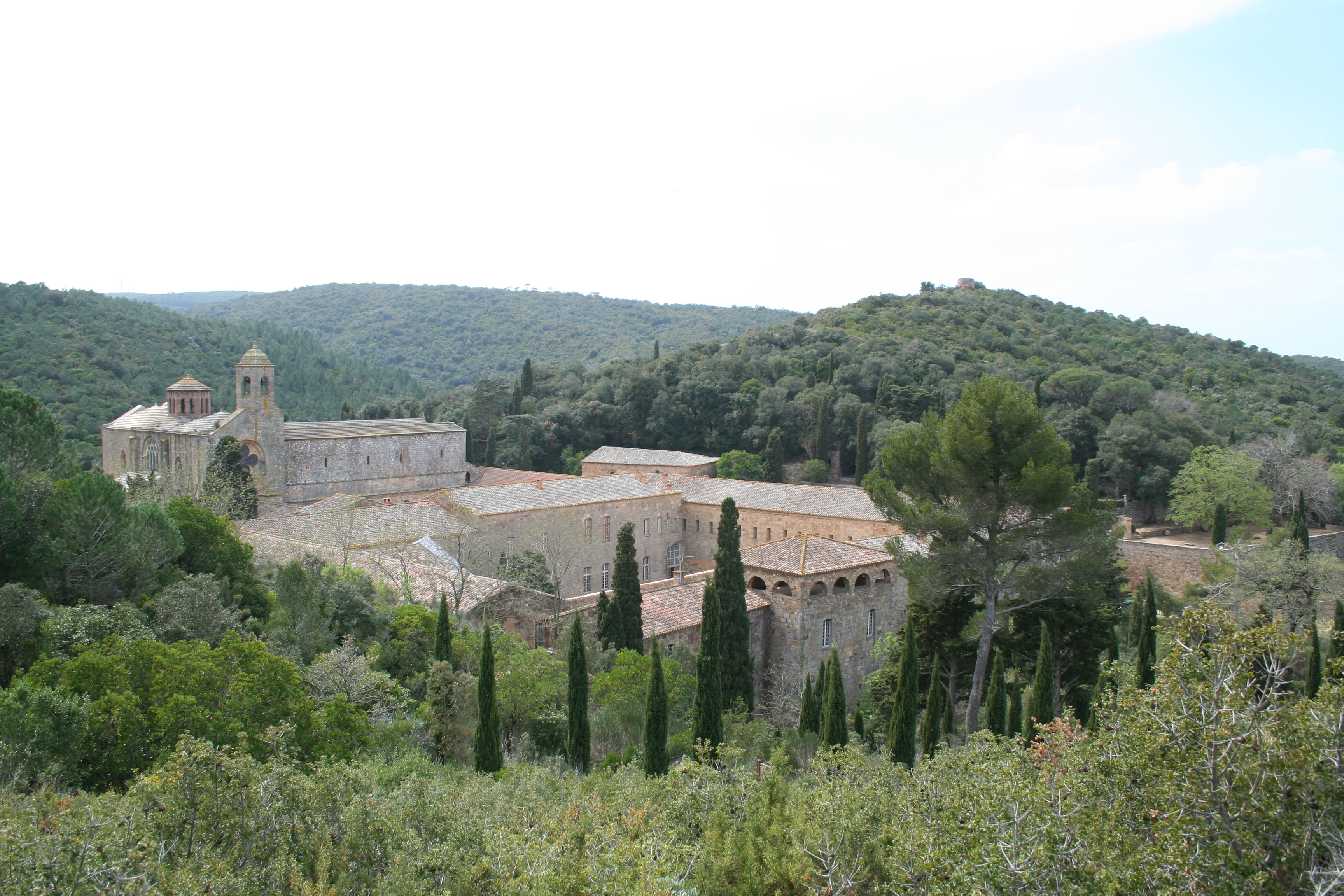 Abbaye de Fontfroide - Narbonne - Aude - France - Mérimée PA00102787 .